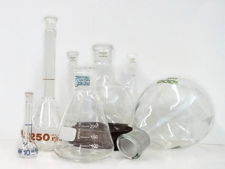 Chemical flasks ==Description in de wikipedia== *Beschreibung: Glaskolben für die Chemie *Fotograf oder Zeichner: -grimbart- *Lizenzstatus: GNU FDL